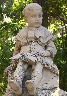 cimitero